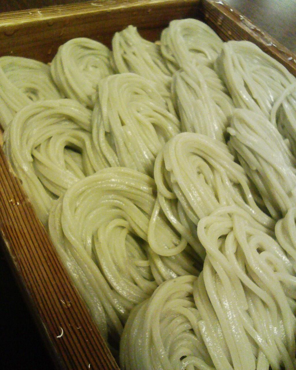 小千谷駅前にある「和田」のへぎそば。